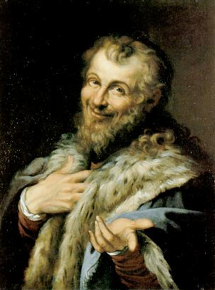 Il Democrito è un quadro di Agostino Carracci, che si trova a Napoli nel Museo di Capodimonte, facente parte della Collezione Farnese. Il dipinto riprende l'iconografia del filosofo Democrito che ride sulla stupidità del mondo, spesso in pendant con il ritratto di Eraclito che invece piange su di essa.